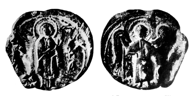 Пячатка з выявай Маці Божай і архангела Міхаіла